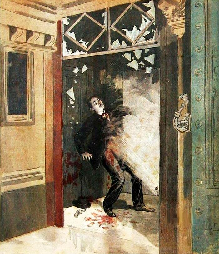 Amédée Pauwels, de son vrai nom Désiré Joseph Pauwels, né 29 janvier 1864 en Belgique et mort le 15 mars 1894, est un anarchiste individualiste belge.